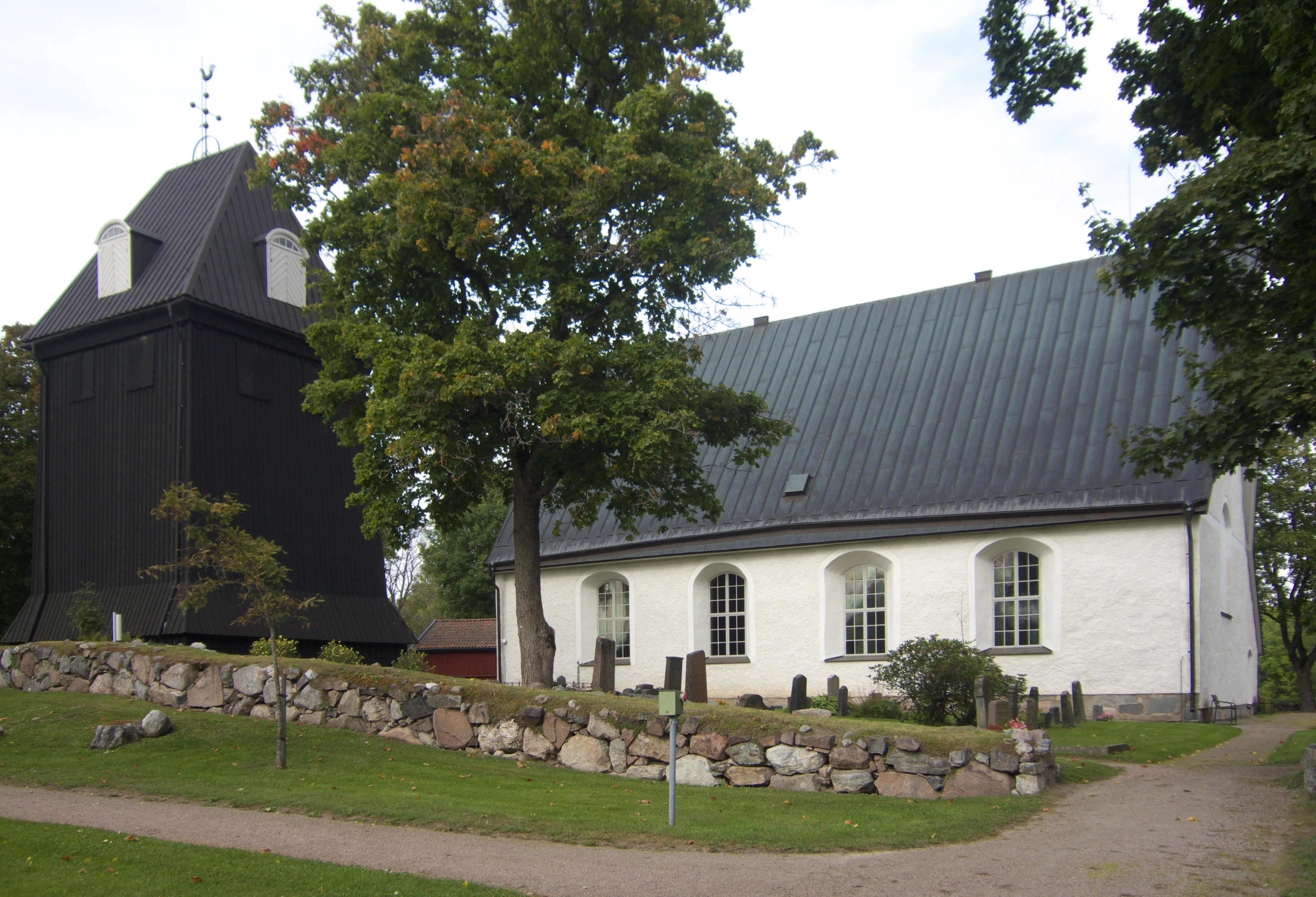 Bergs kyrka, Västerås stift